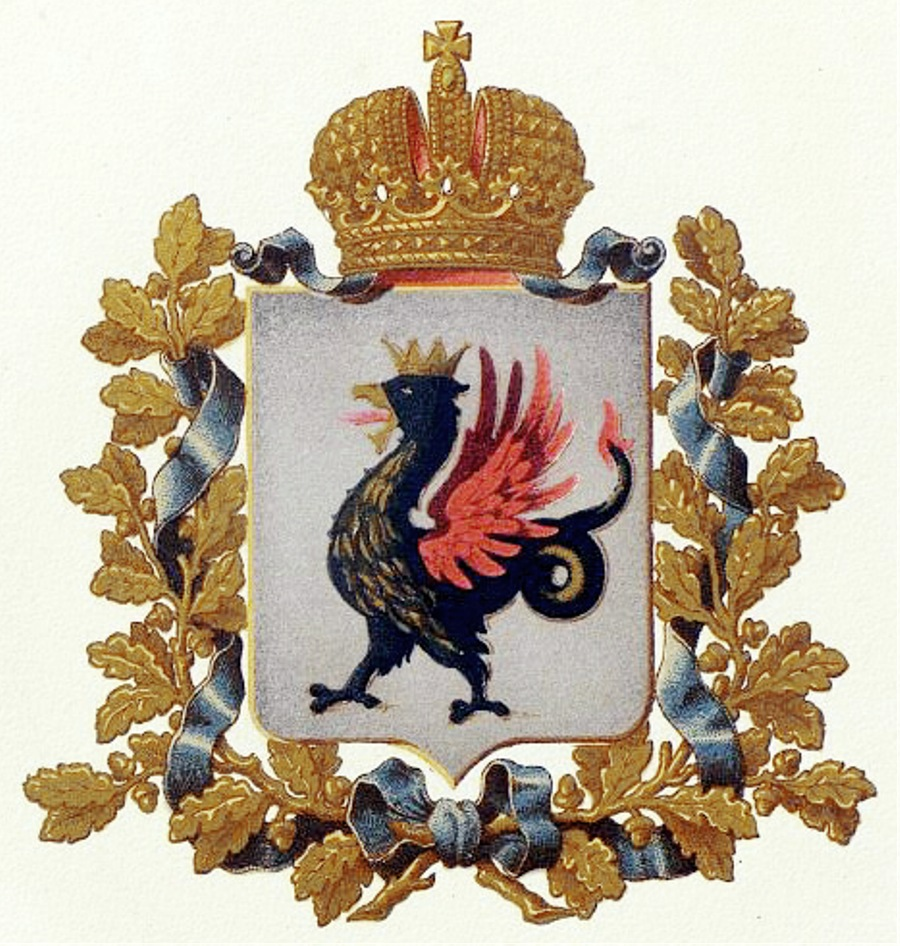 Official Russian Empire coat of arms Kazan Governorate. Герб Российской Империи Казанской губернии в Гербовнике Бенке. Утверждён Императором Всероссийским Александром Вторым.